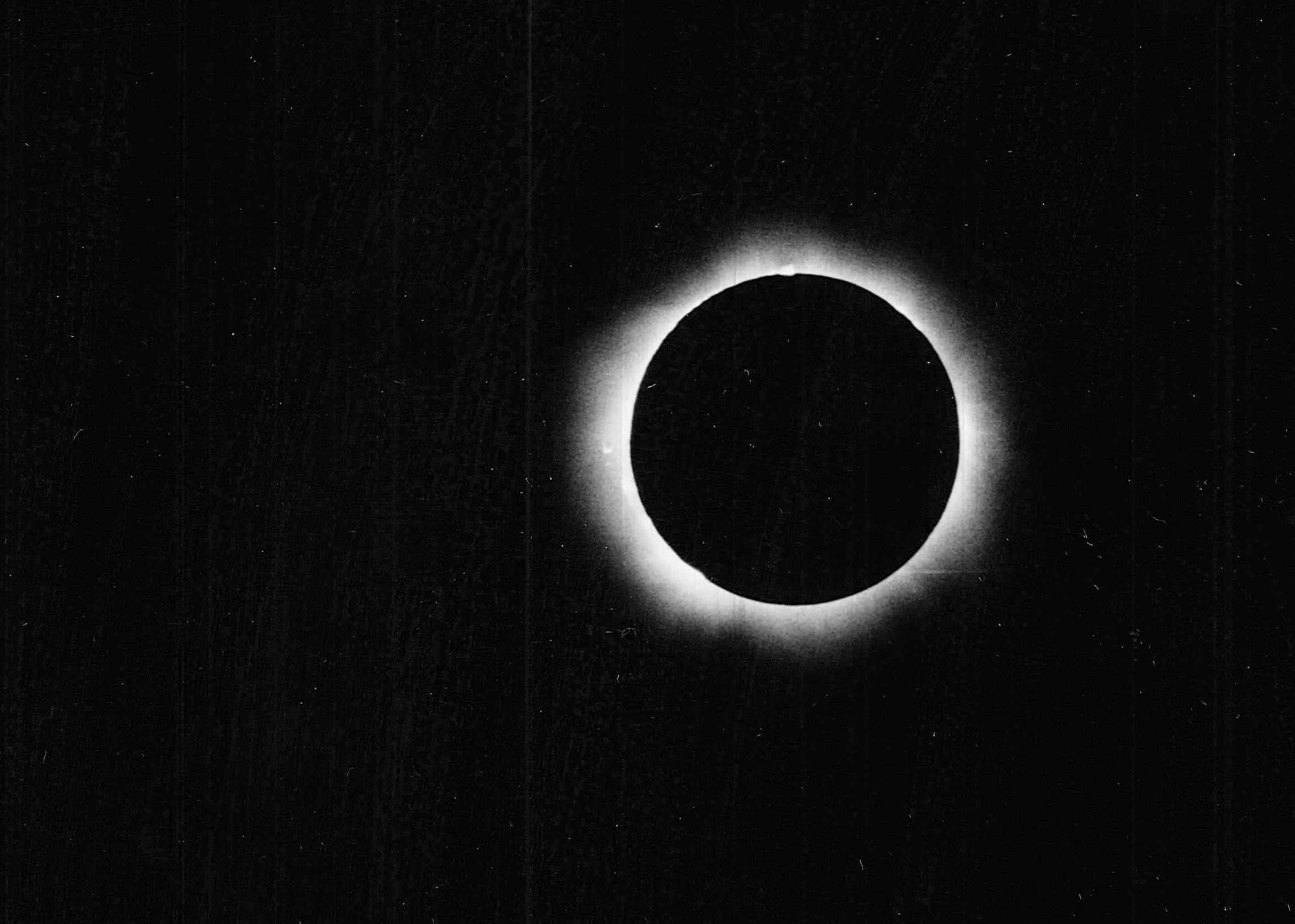 Eclissi solare totale ripresa a Salisburgo il giorno 11 agosto 1999